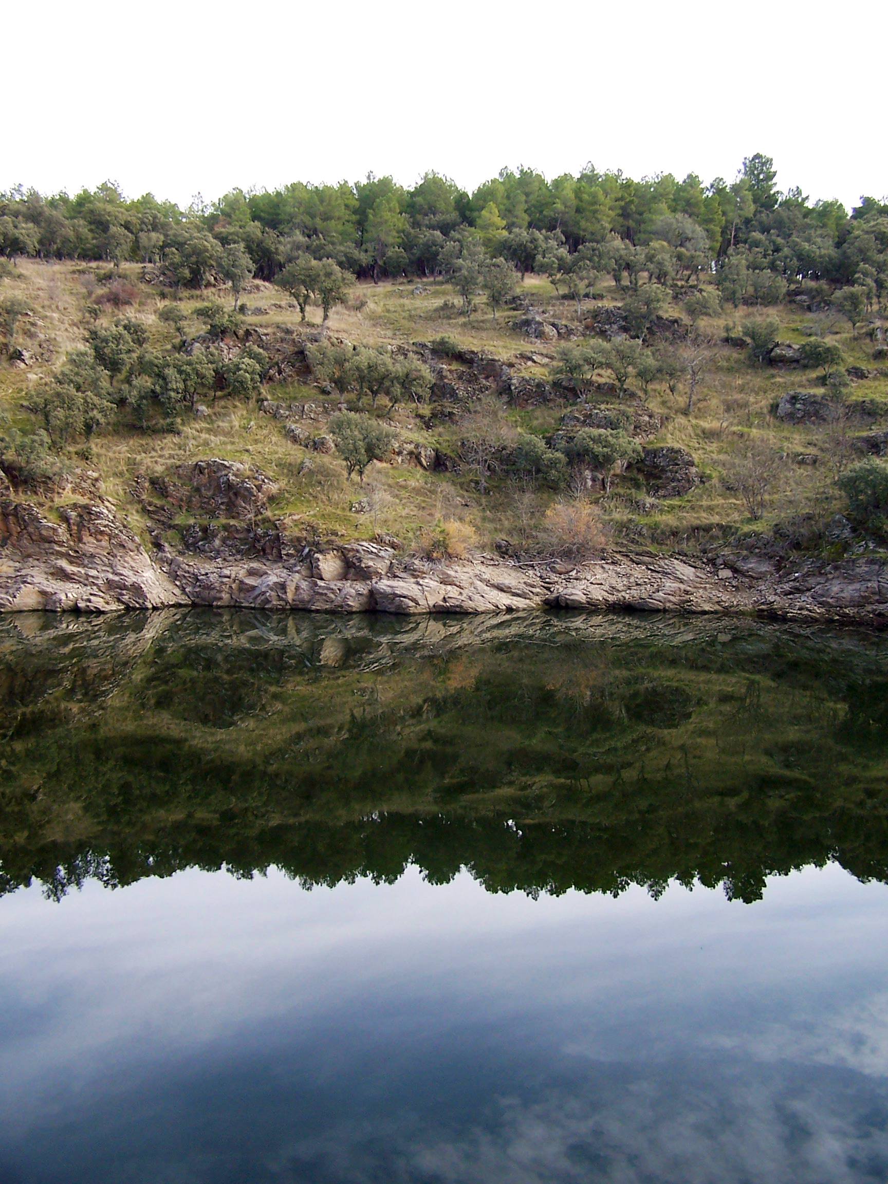 Cuenca del río Lozoya y Sierra Norte This is a photography of a Special Area of Conservation in Spain with the ID: ES3110002. Natura2000 entry, EEA entry